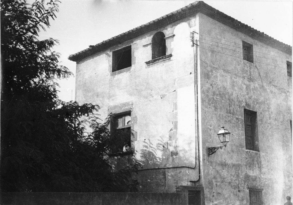 Vista parcial de Ca l'Alegre. Jordi Audet i Viñals (1926-11)